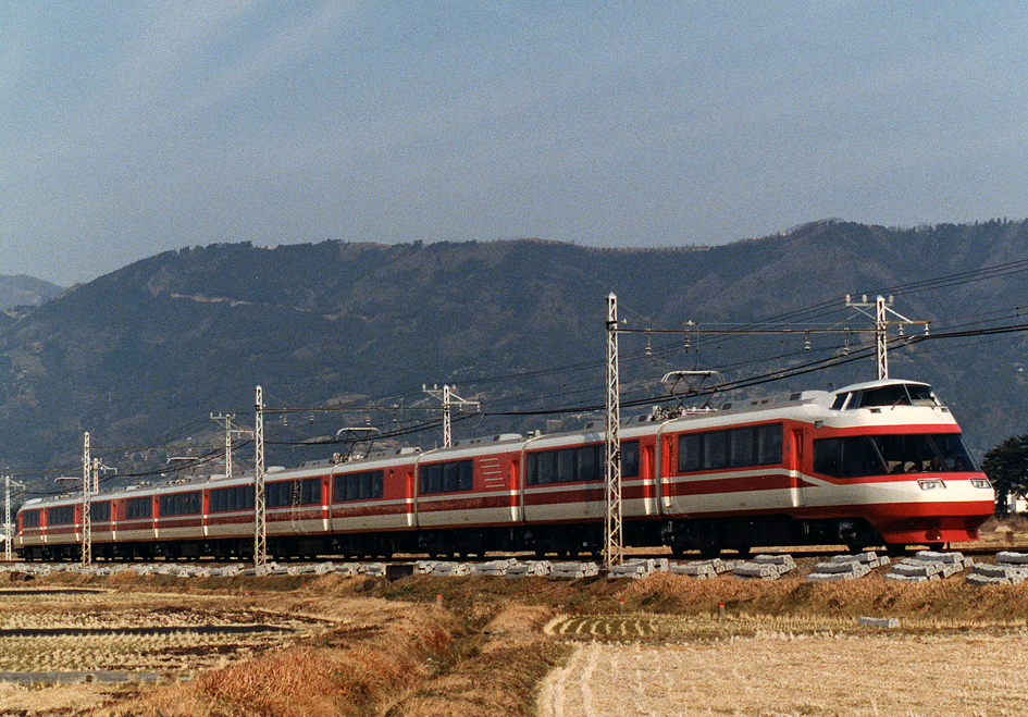 小田急電鉄 10000形電車 HiSE